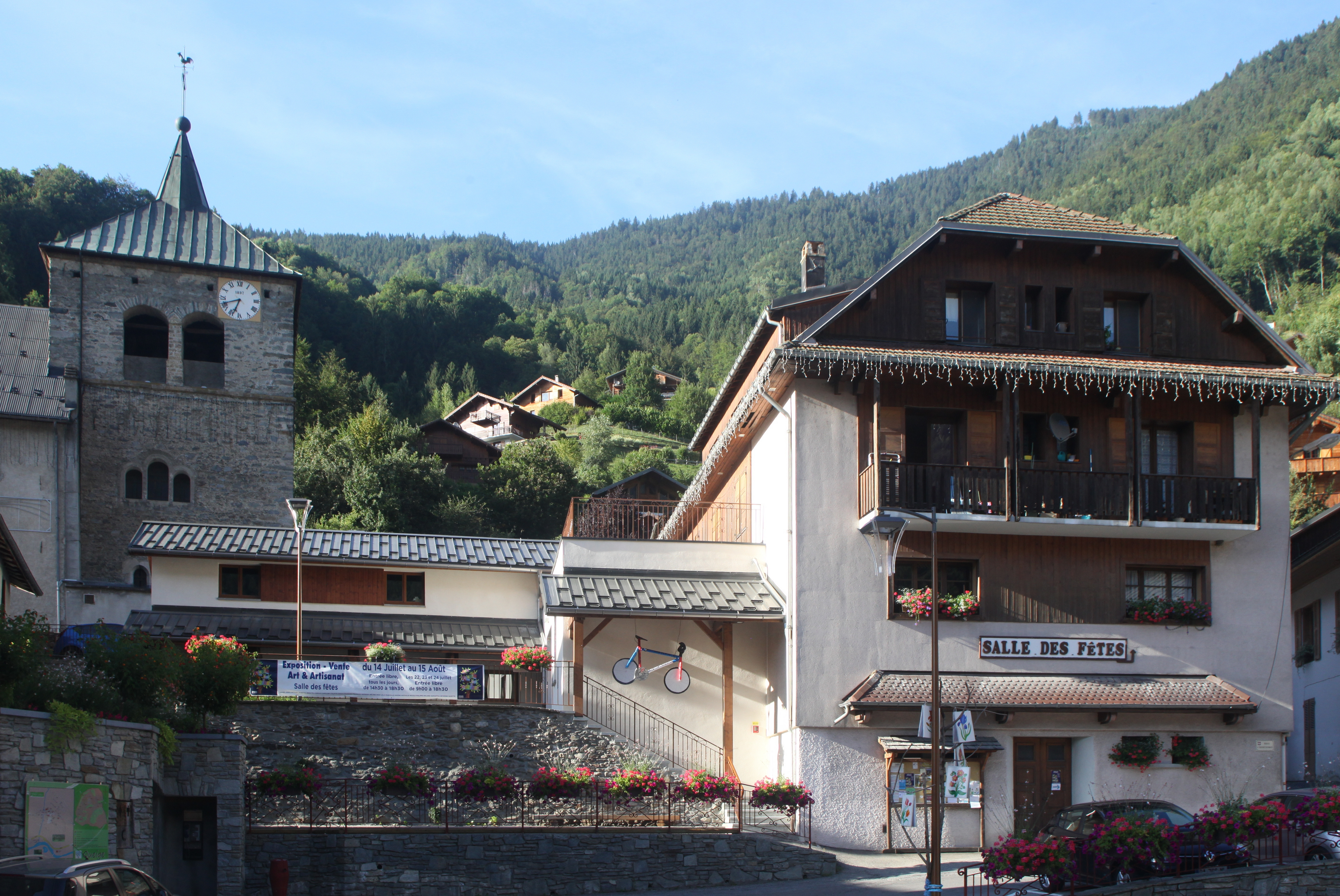 Église et salle des fêtes de Queige (Savoie).